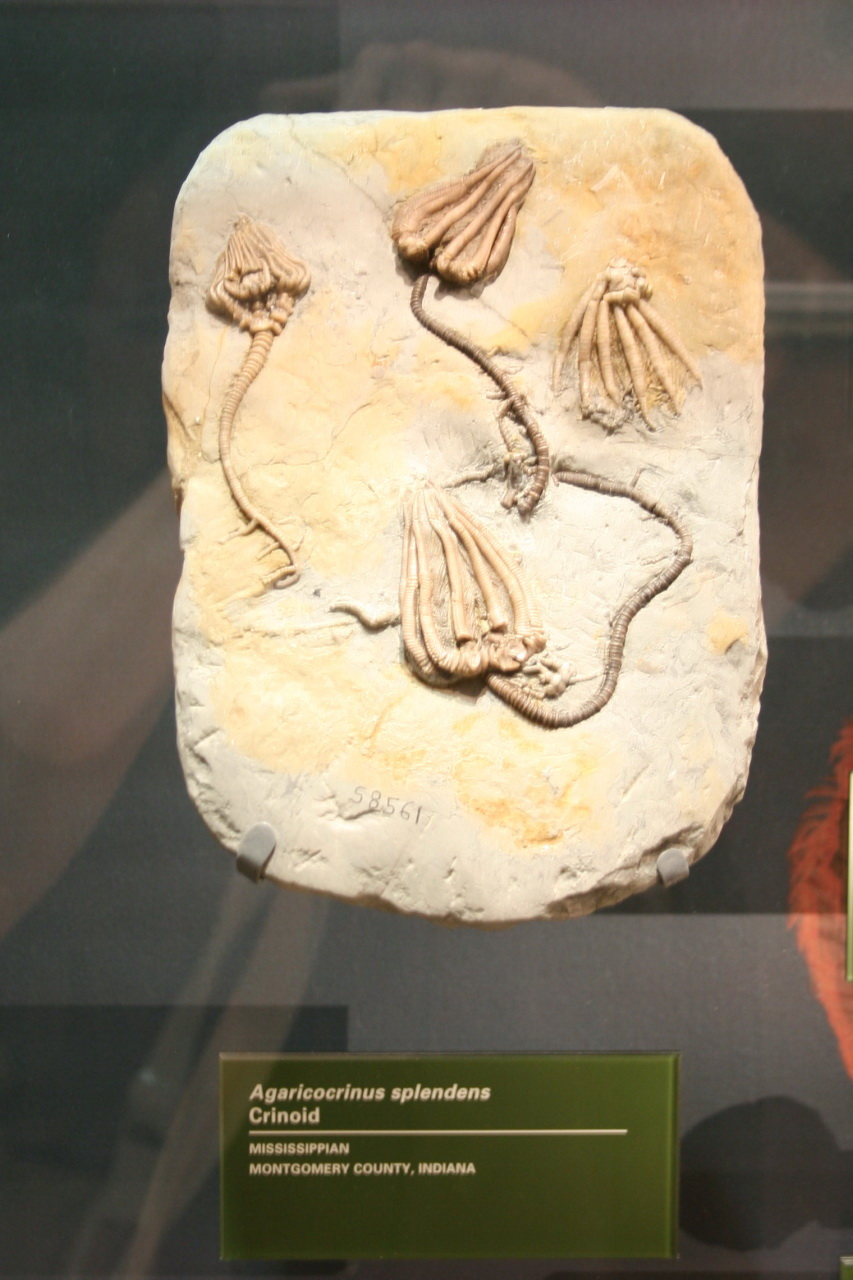 Agaricocrinus splendens (Crinoid)